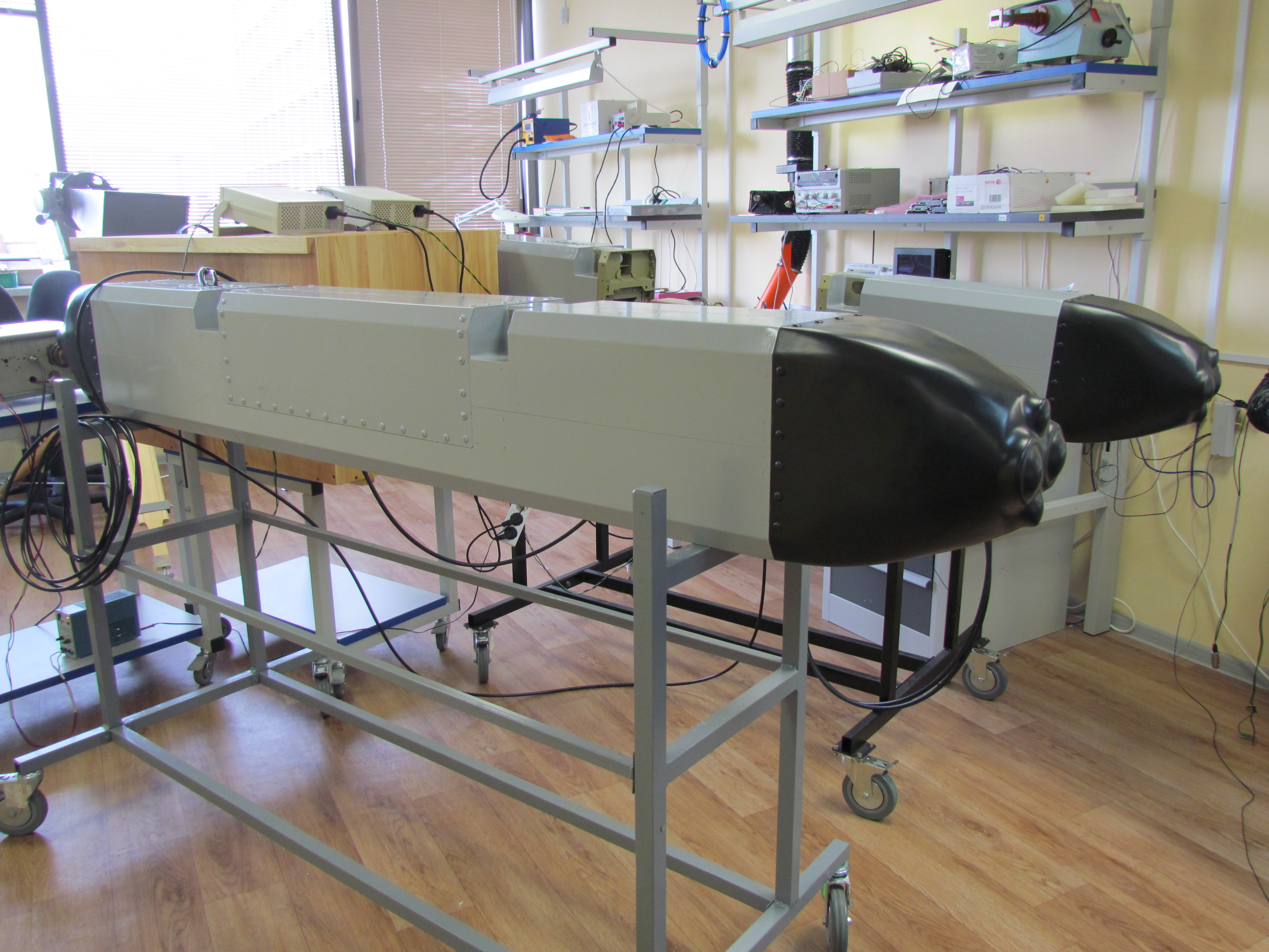 Talisman, pod